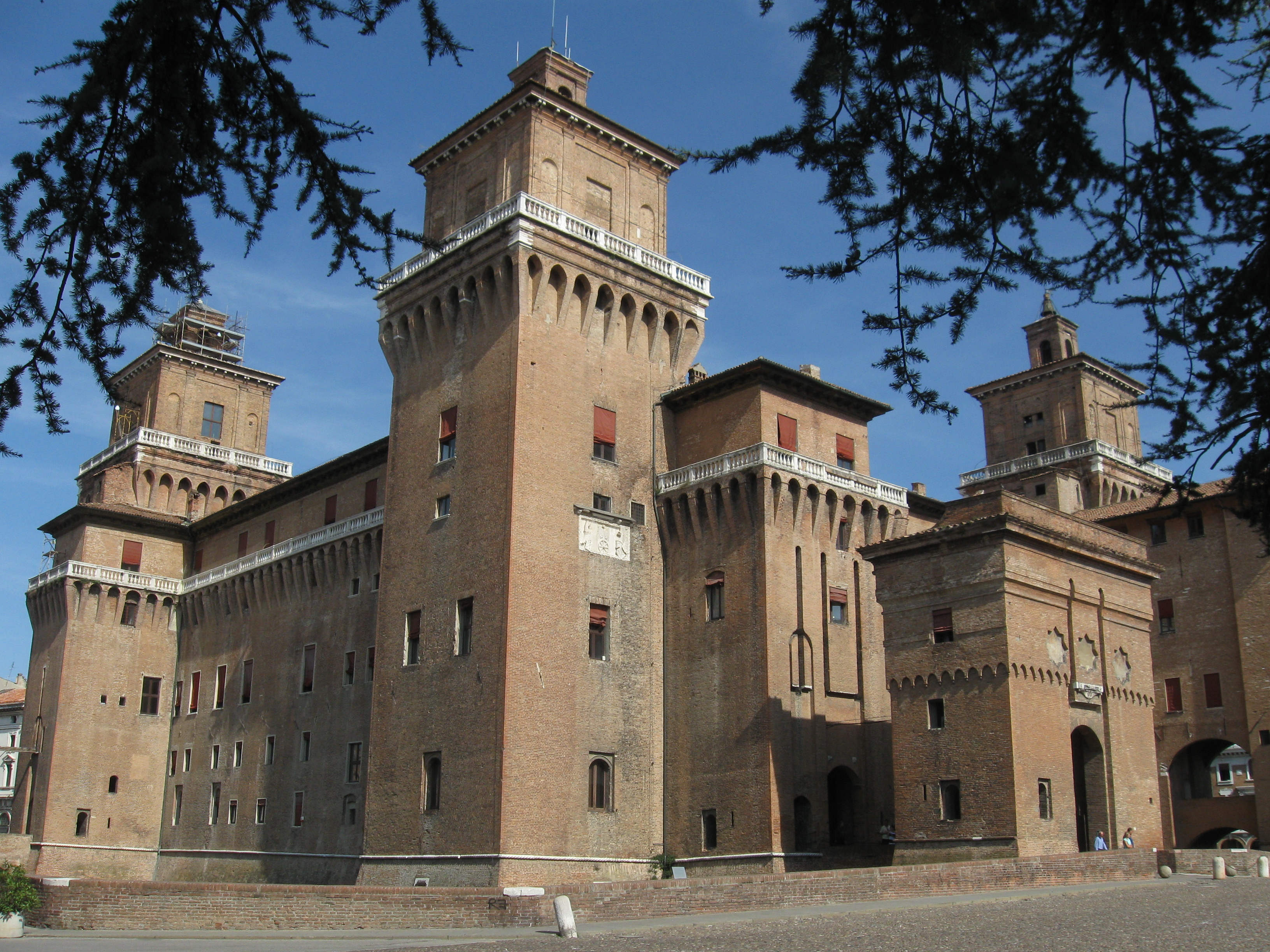 Castello Estense - MIBAC This is a photo of a monument which is part of cultural heritage of Italy.